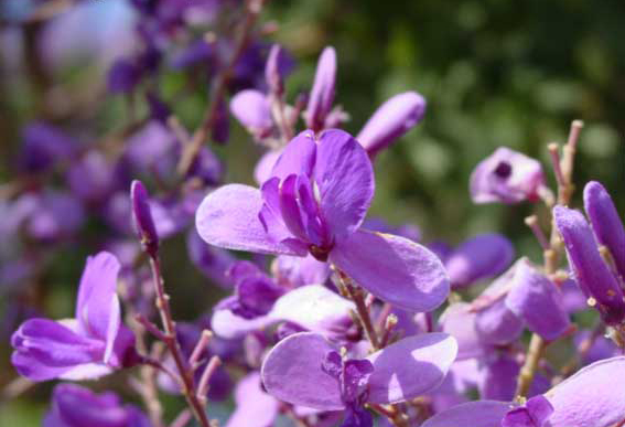 Flor da Sucupira-branca (Pterodon emarginatus), Chapada dos Veadeiros, Brasil.